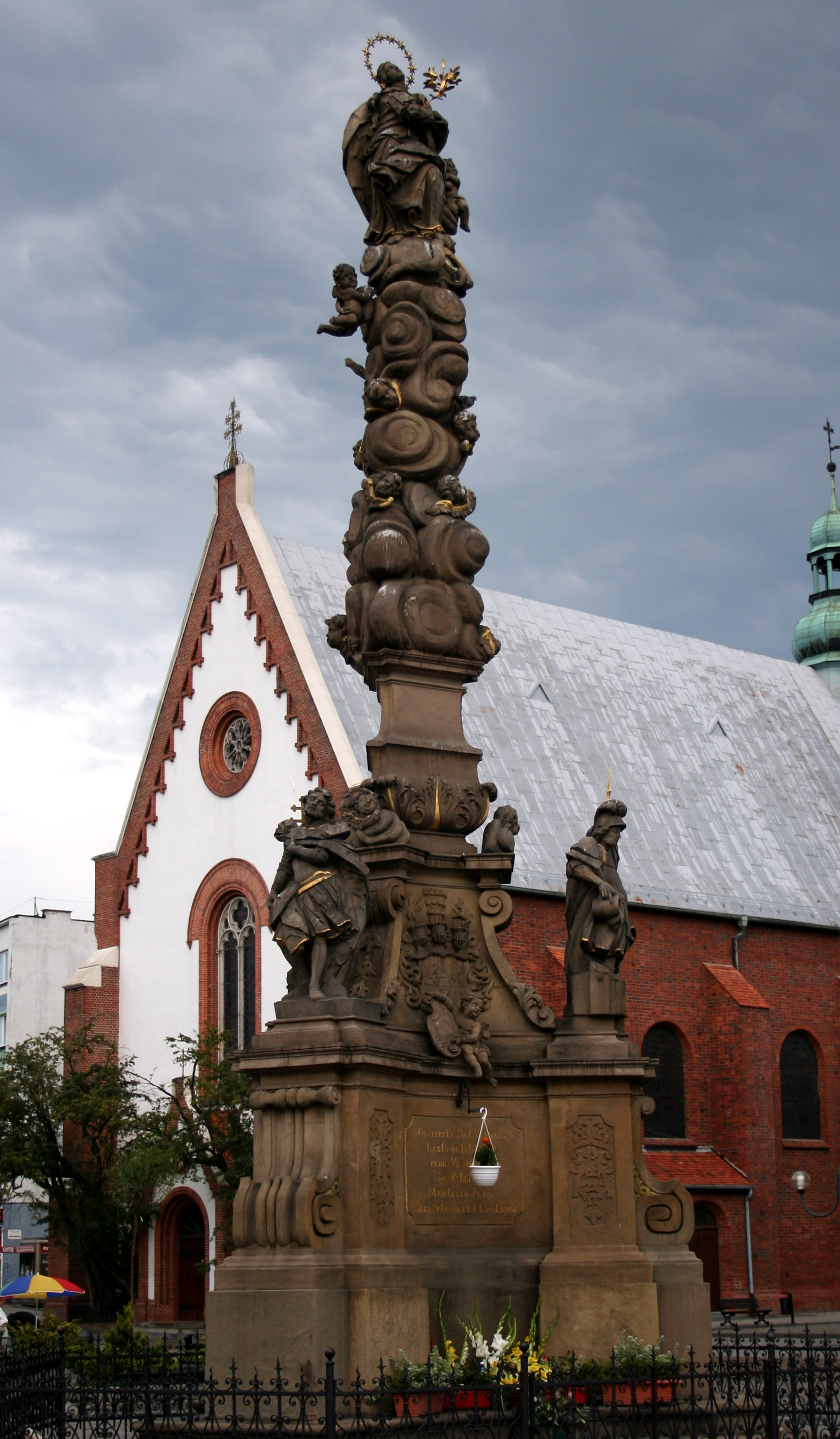 Kolumna Maryjna na rynku w Raciborzu